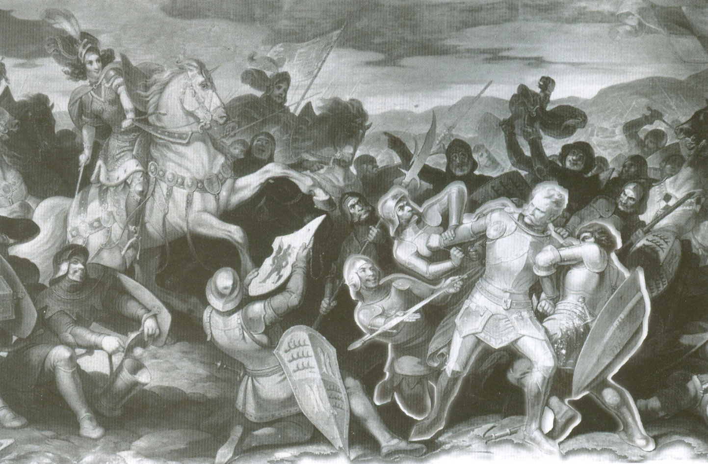 Die Gefangennahme Friedrich des Öttingers von Zollern durch Henriette von Mömpelgard Historienfresko aus dem Neuen Schloss, Stuttgart Gegenbaur malte als Hofmaler 16 Fresken aus der württembergischen Geschichte.,Diese wurden im Zweiten Weltkrieg zerstört.